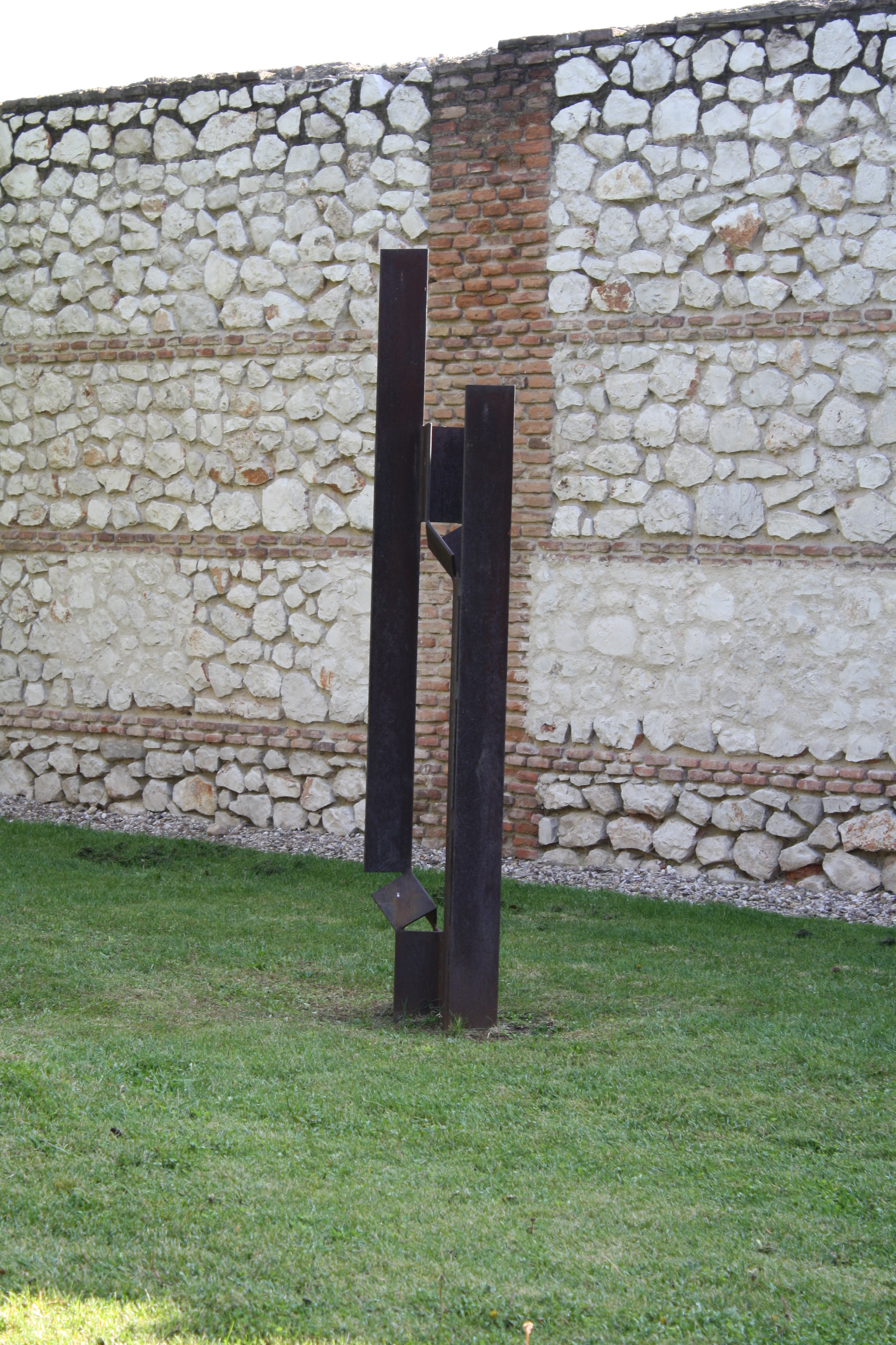 Museo de escultura al aire libre de Alcalá de Henares (Comunidad de Madrid - España). Escultor: Camín.